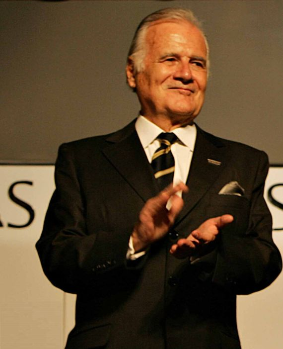 (portuguese) O jornalista ítalo-brasileiro Mino Carta, diretor da revista Carta Capital